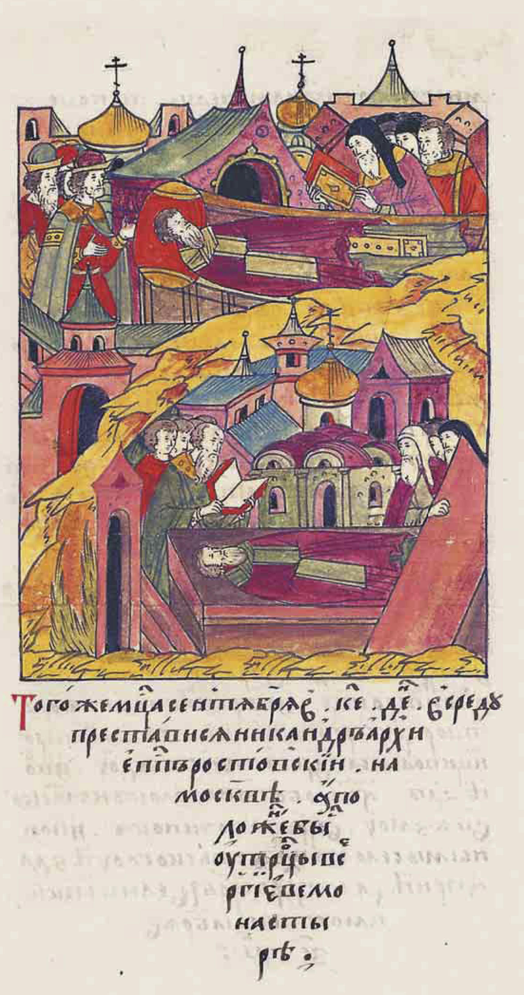 Лицевой летописный свод "В том же меся- це сентябре в 25 день в среду преставился Никандр, архиепископ Ростов- ский, в Москве, а по- ложен был у Троицы в Сергиеве монастыре."